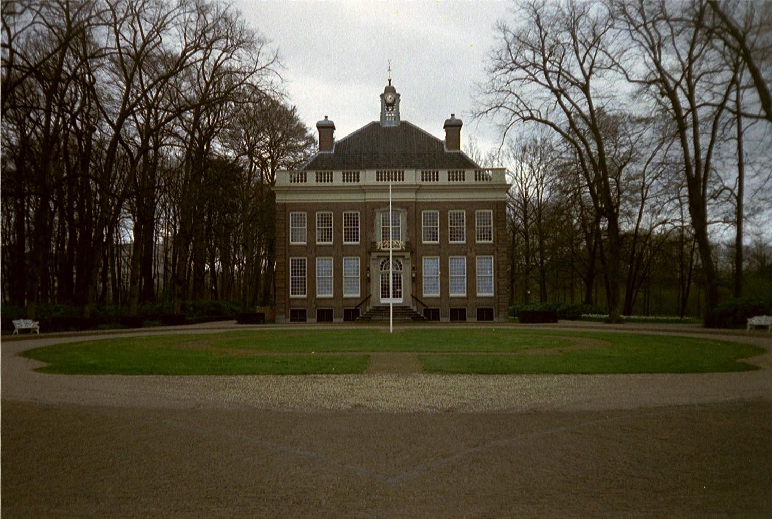 Sparrendaal, Hoofdstraat 87-91, Driebergen. Foto genomen op 11 april 2004 en geupload door maker.